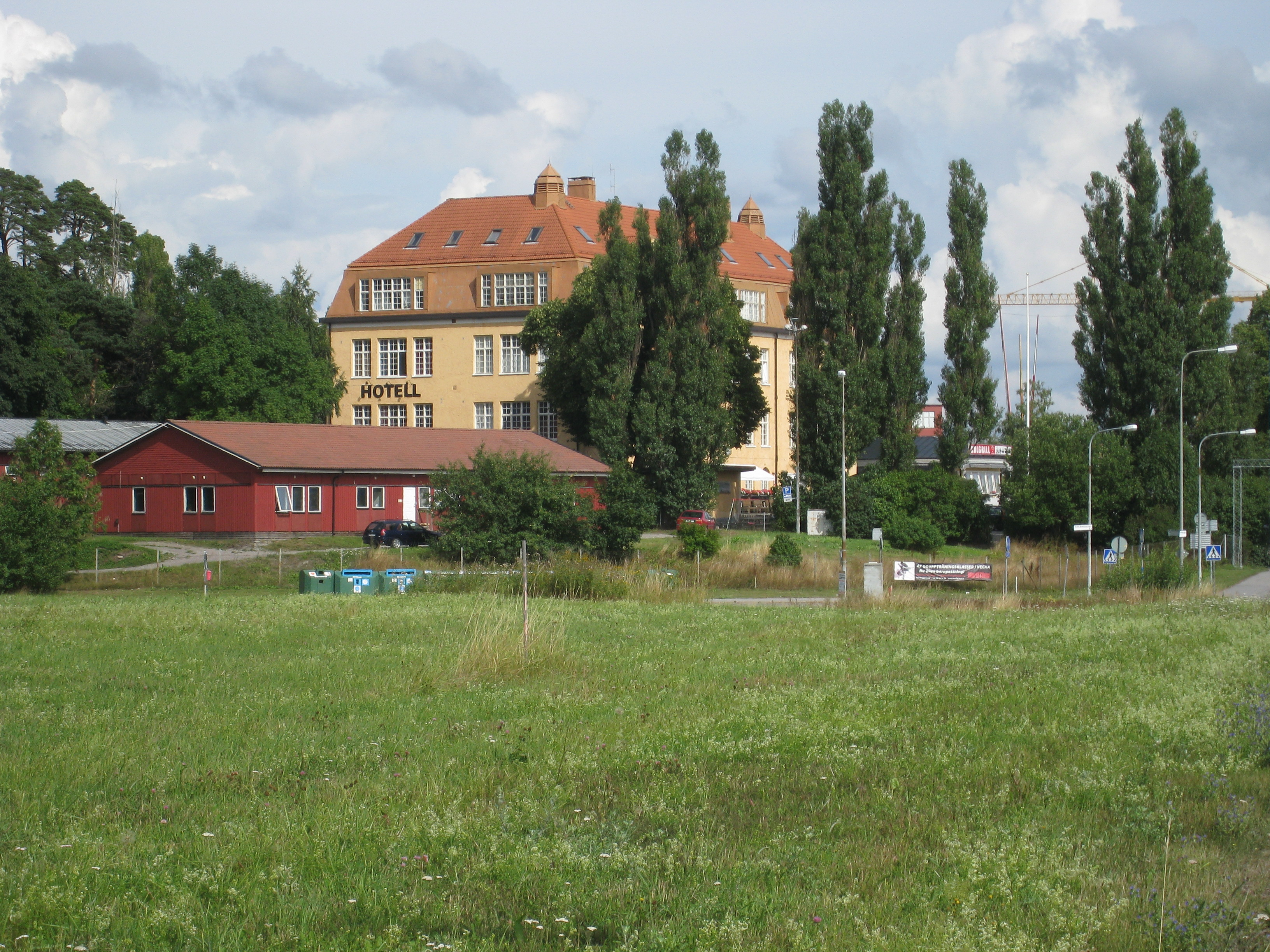 Bällstalunds folkskola i Bromma, byggd 1912, Bällstavägen 100, korsningen Travbanevägen-Bällstavägen, nu hotell för Maranataförsamlingen i Stockholm..